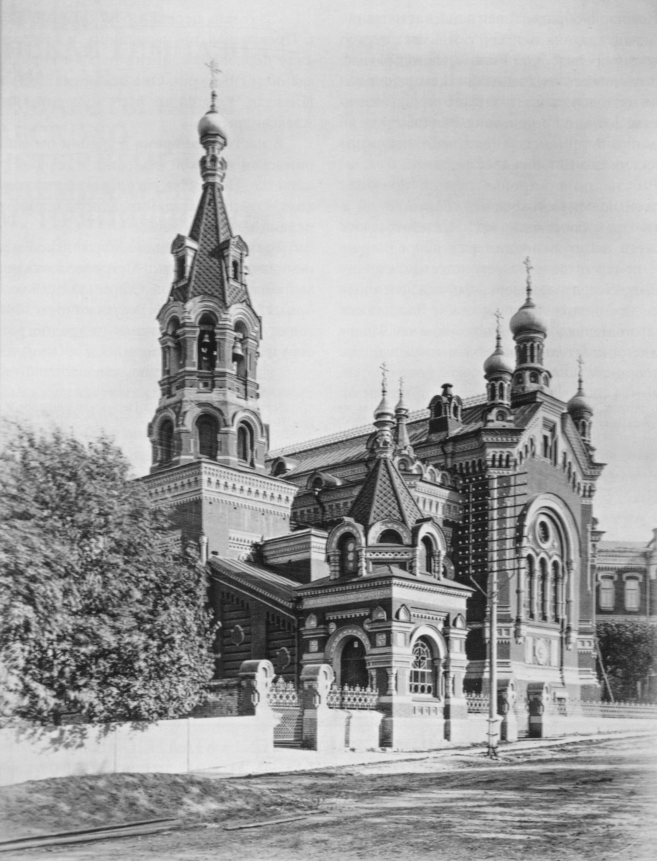 Никольская домовая церковь при Мариинской женской гимназии в Перми